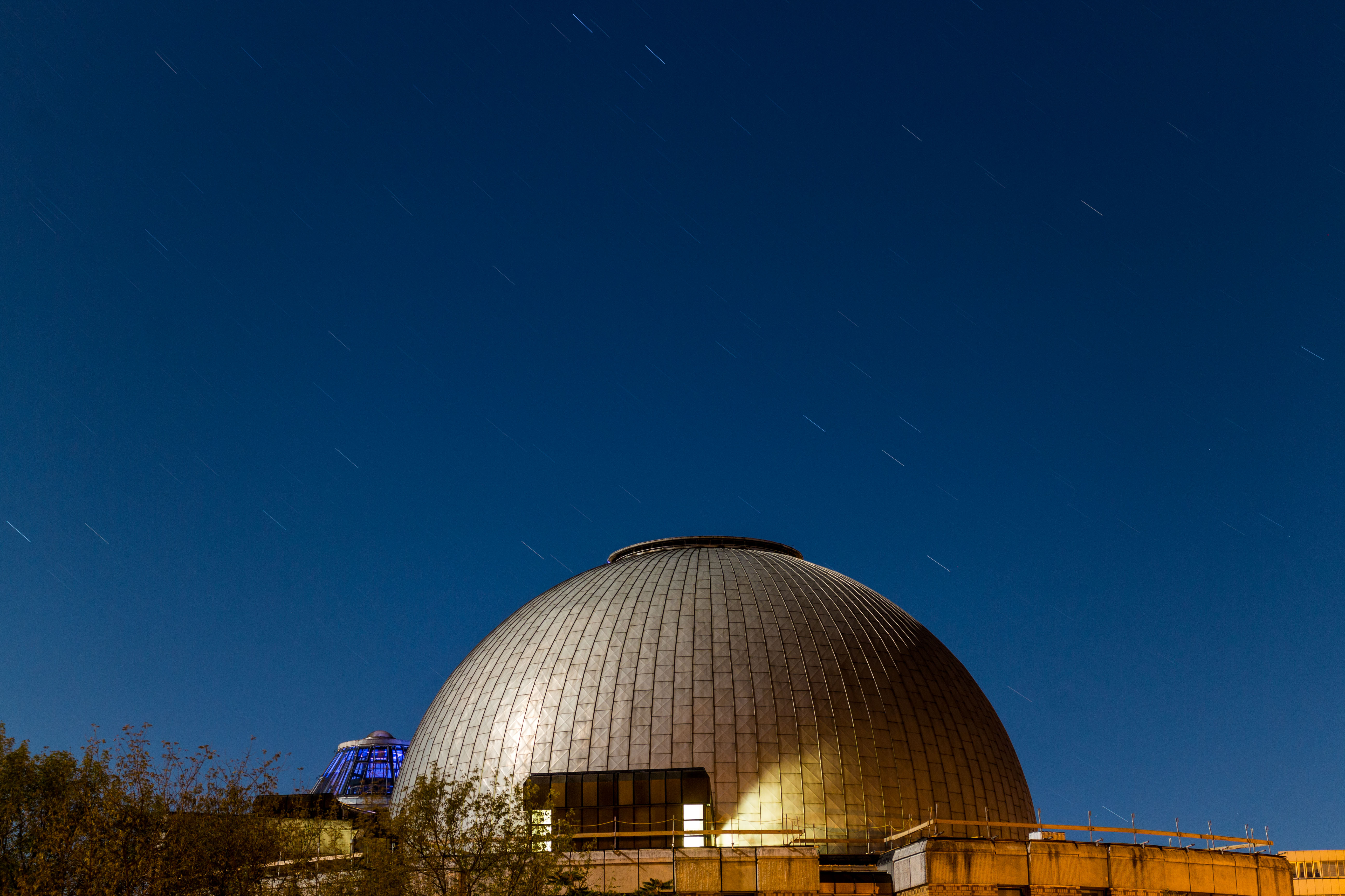 Zeiss Großplanetarium mit Sternenhimmel in Bewegung